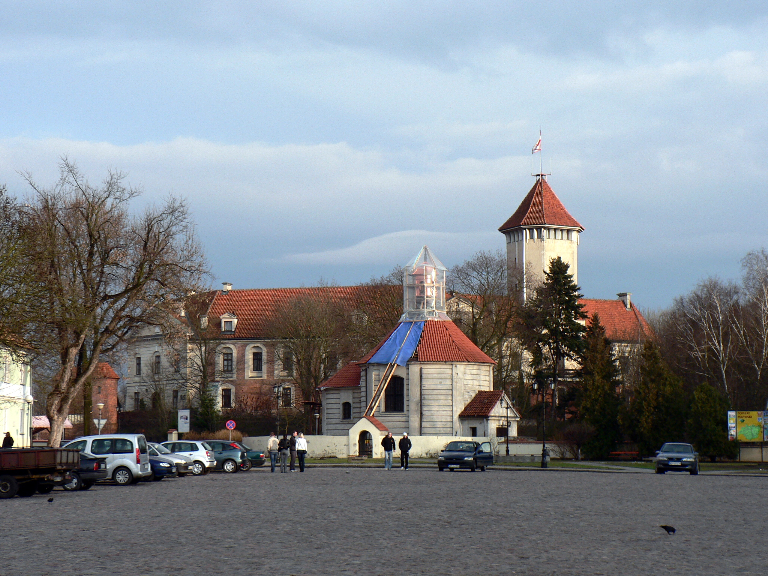 Rynek i zamek w Pułtusku